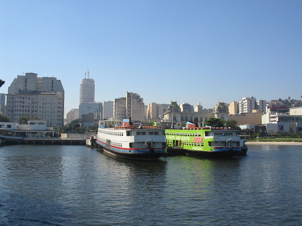 Chegada da Barca - Niteroi